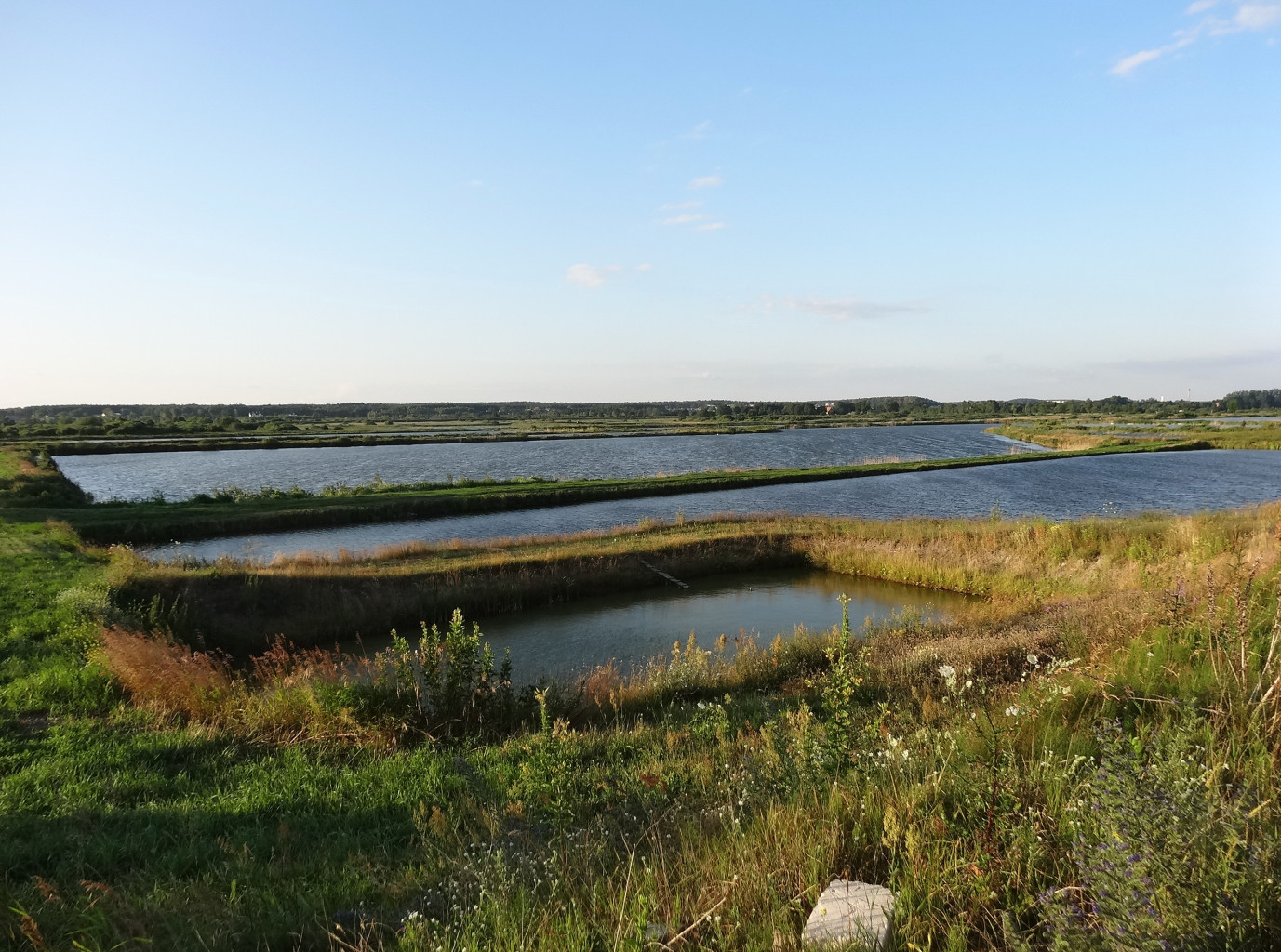 Stawy rybne w miejscowości Lisi ogon, gmina Białe Błota, powiat bydgoski. Stawy położone są w Dolinie Kanału Bydgoskiego